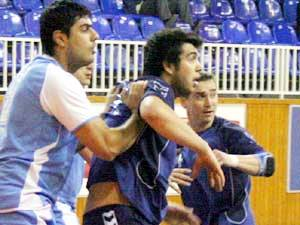 чемпионат Турции по гандболу. игра Беледийеспор - Анкара БШБ